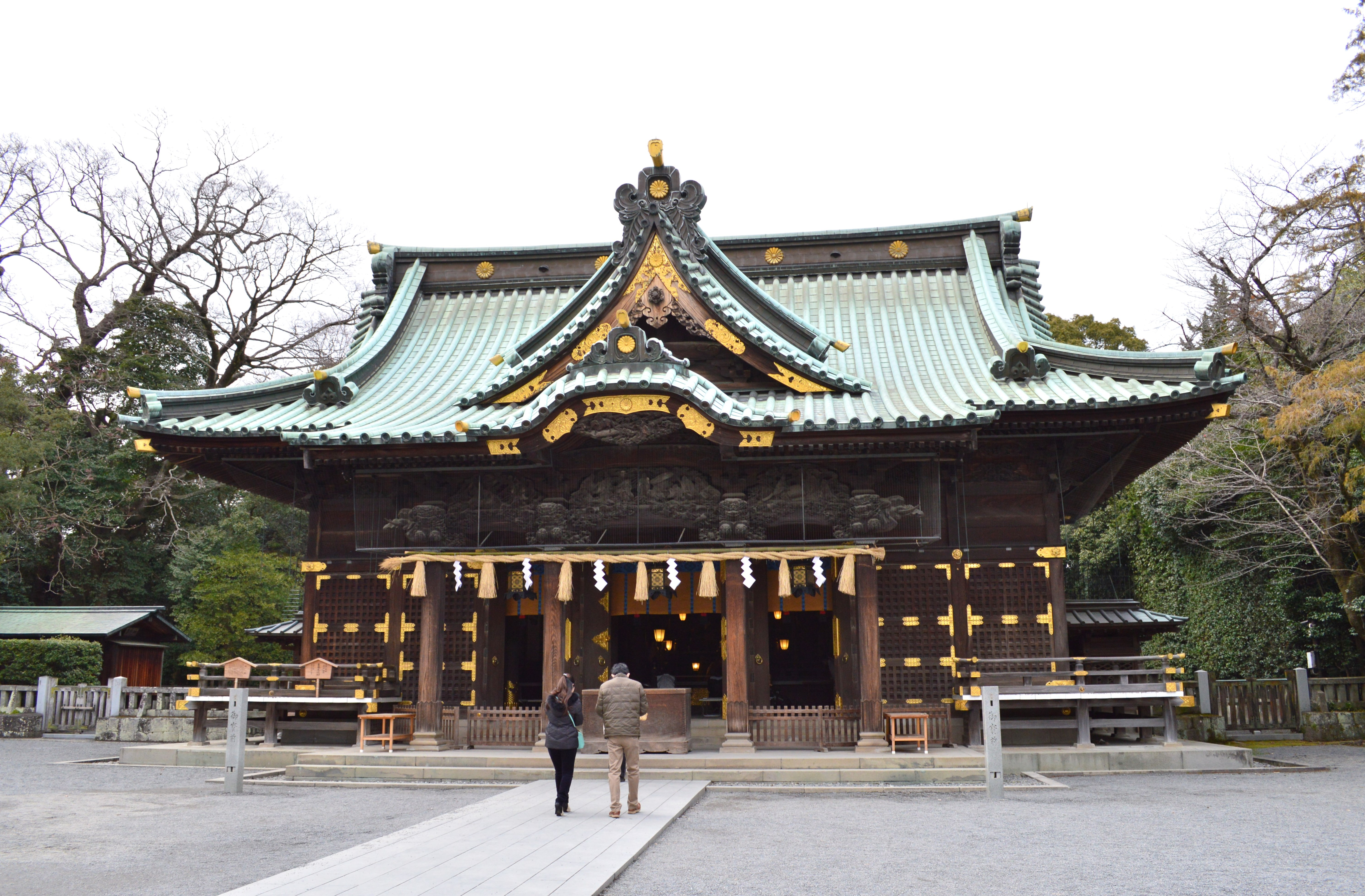 三嶋大社 拝殿 (正面より)